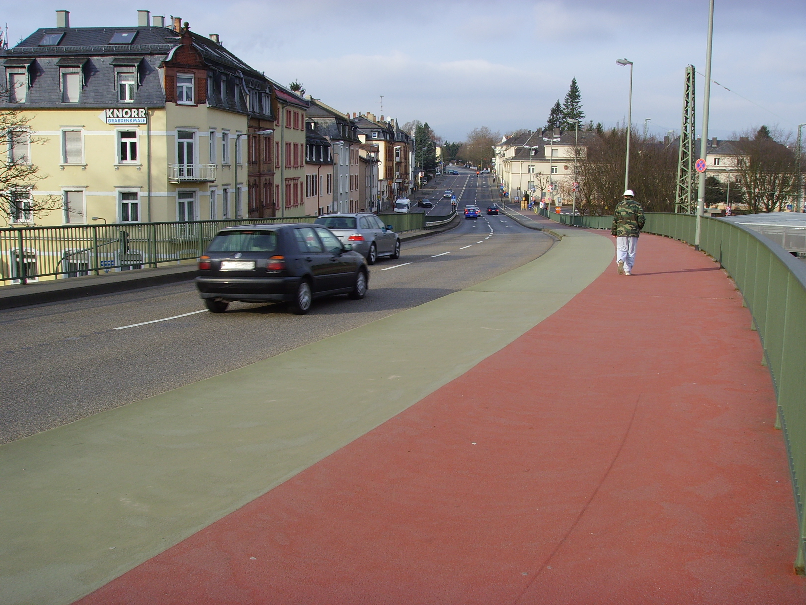 Frankfurt am Main-Heddernheim, Abfahrt der Maybachbrücke zur Dillenburger Straße